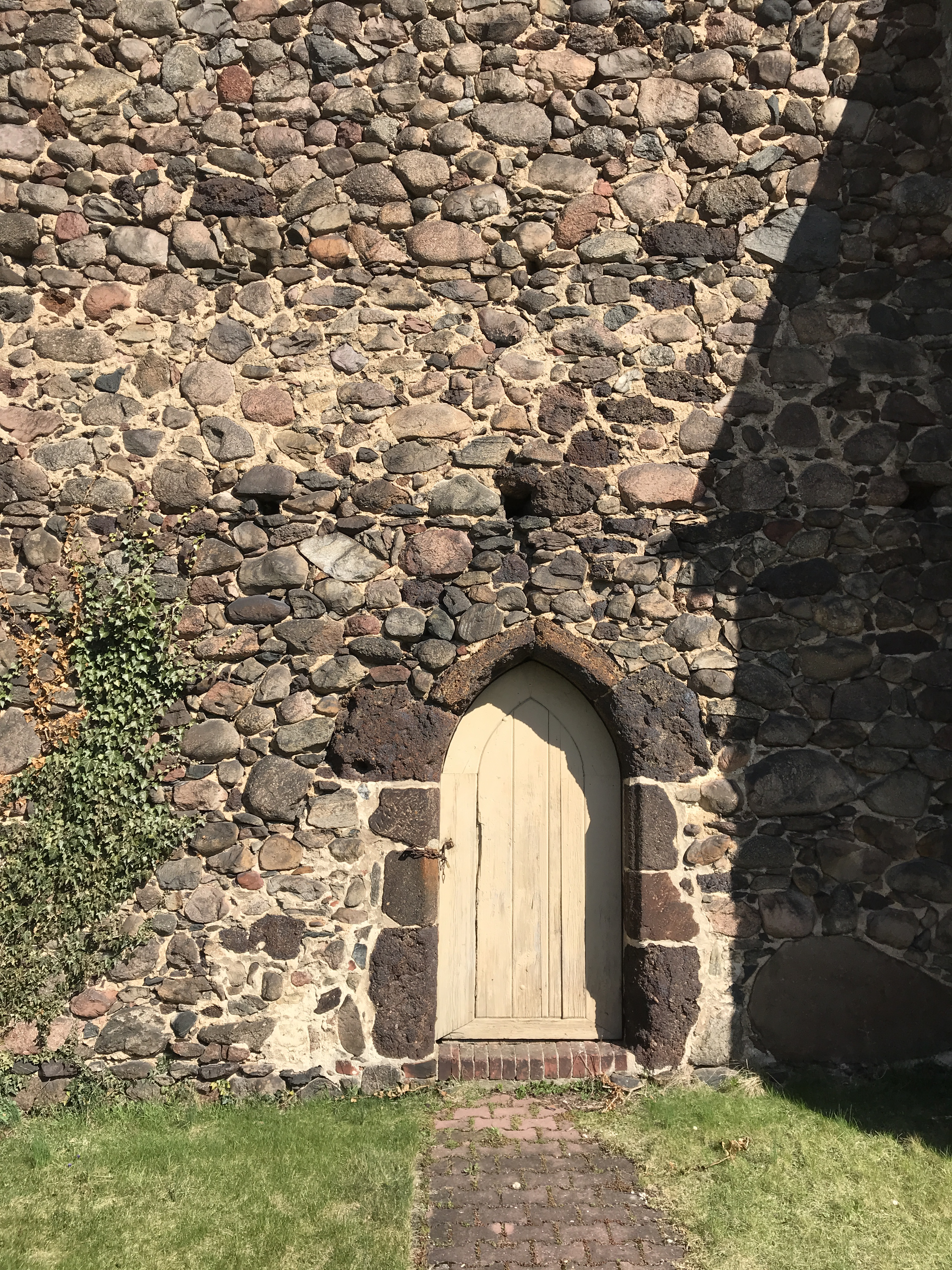 Die Dorfkirche in Calau-Buckow ist eine Feldsteinkirche aus dem 14. Jahrhundert. Von 1898 bis 1904 wurde sie erheblich umgebaut. Dabei erhielt sie eine einheitliche neugotische Kirchenausstattung.